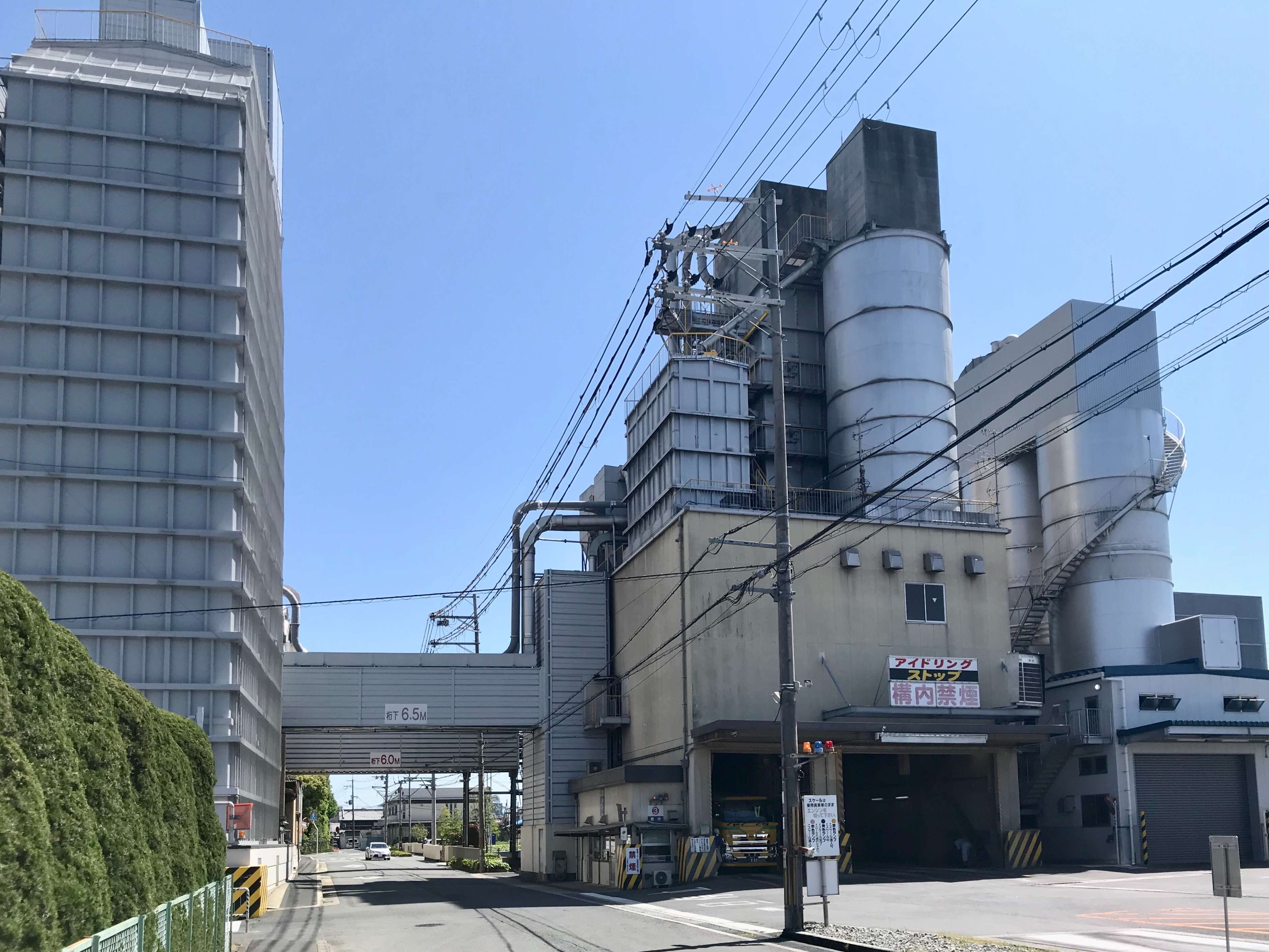 三和澱粉本社工場